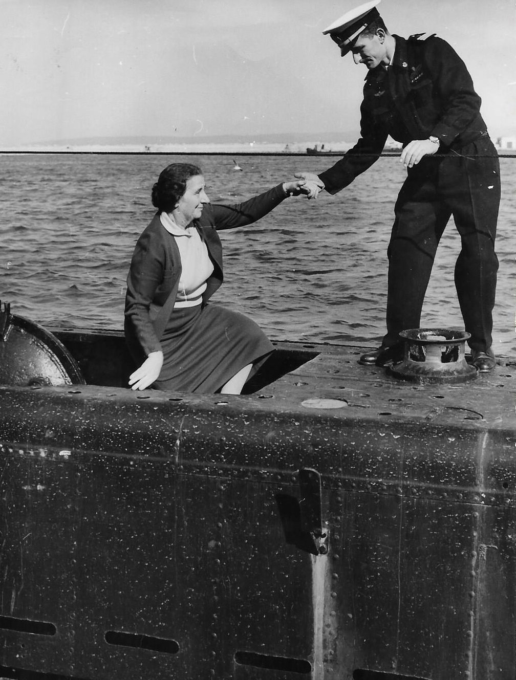 גב גולדה מאיר מבקרת בצוללת אח"י תנין בסיוע של מפקדה יוסף דרור